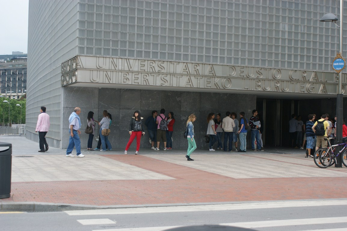 Photo : Béatrice Fainzang